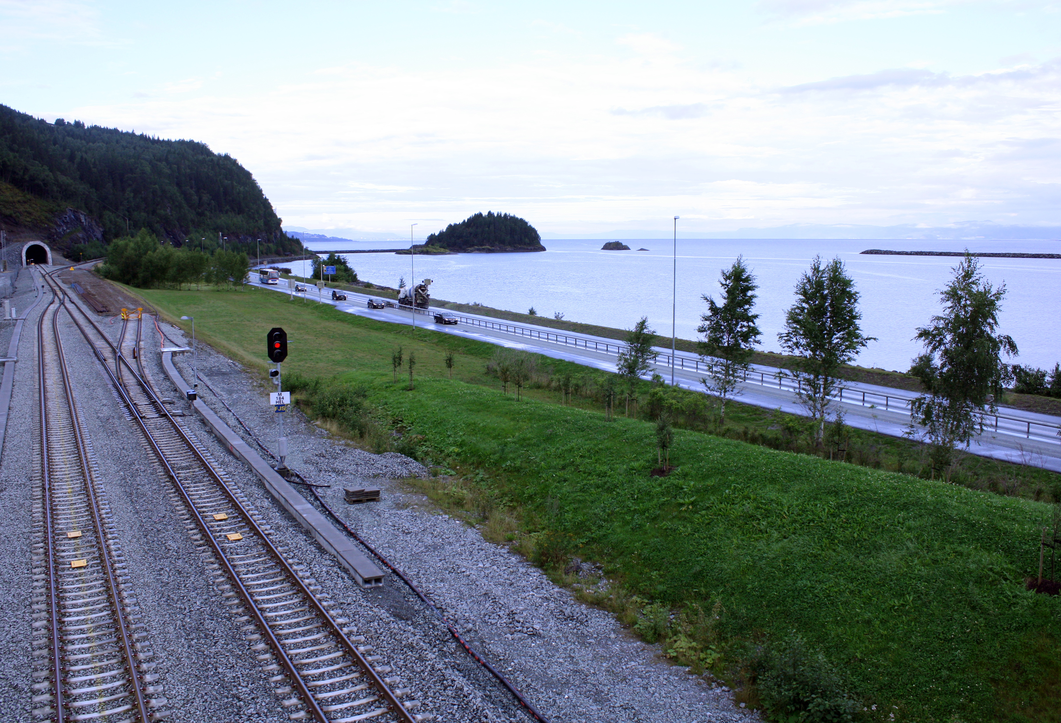 Hell er et av alternativene for lokalisering for logistikknutepunkt ved valg av konseptet Integrert Øst.